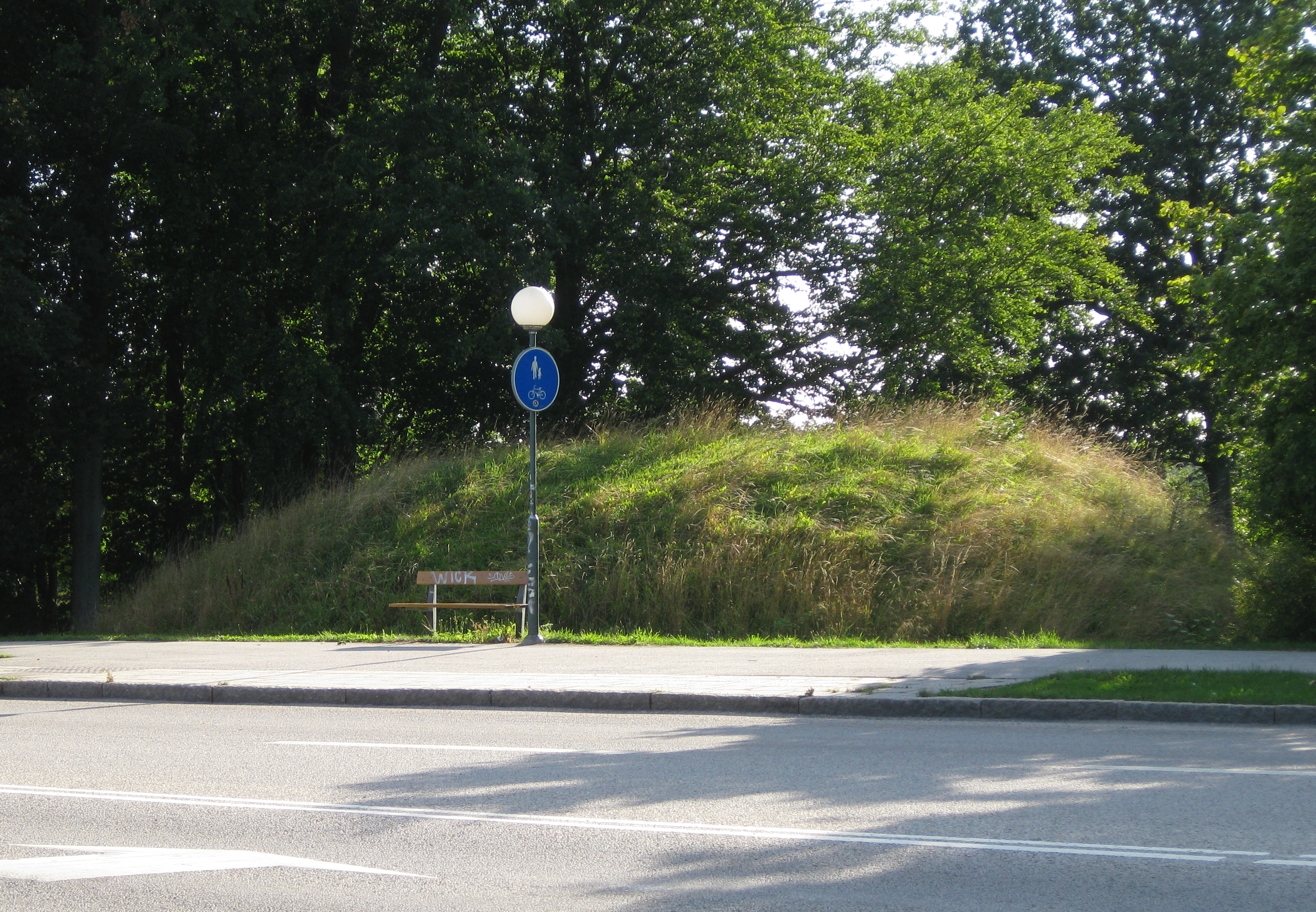 Lerbäckshögen, gravhög i Lunds kommun